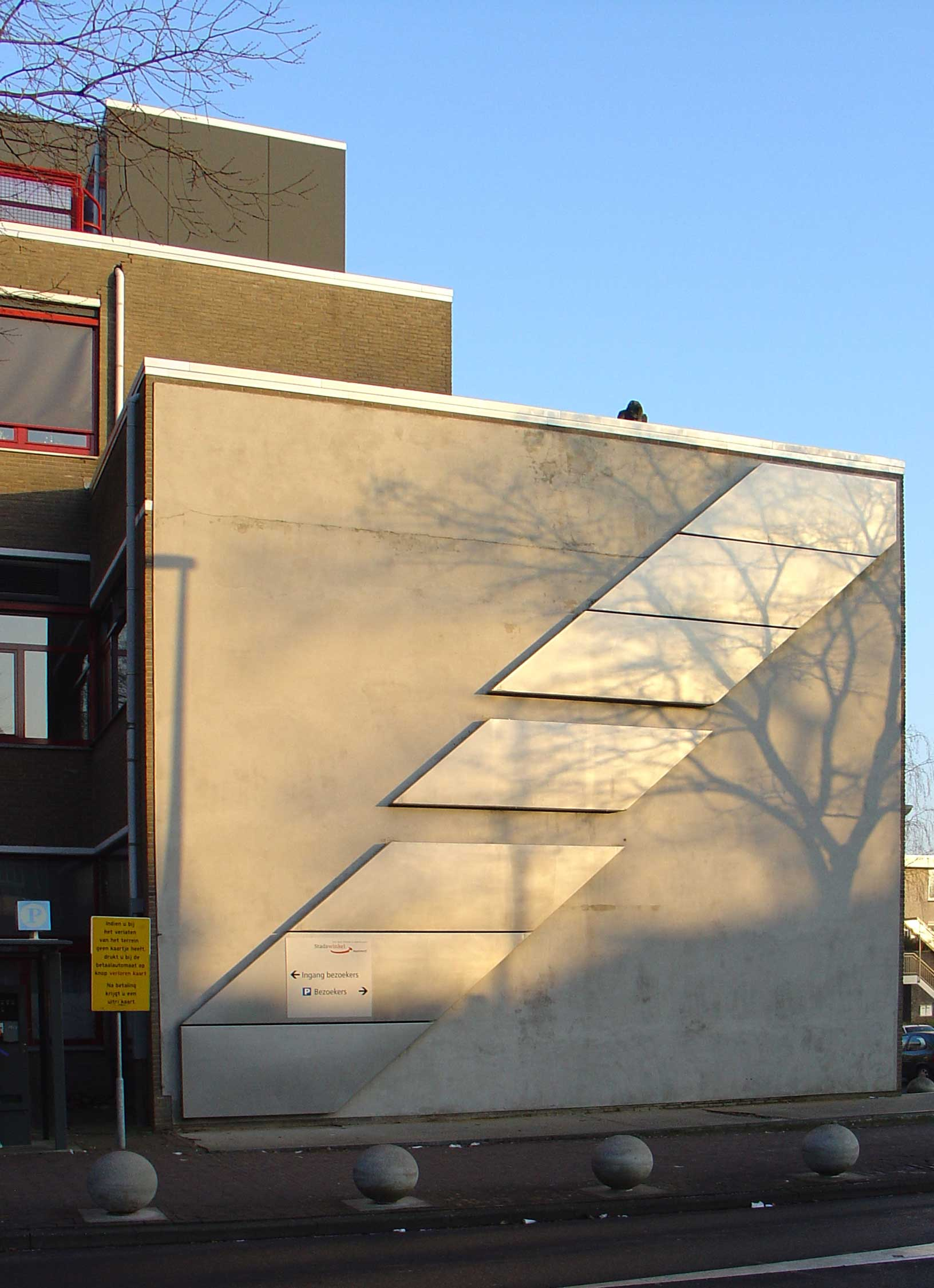 Zonder titel (roestvrij staal, reliëf, 1988) door Alfred Tempelman - Klein Amerika Gouda